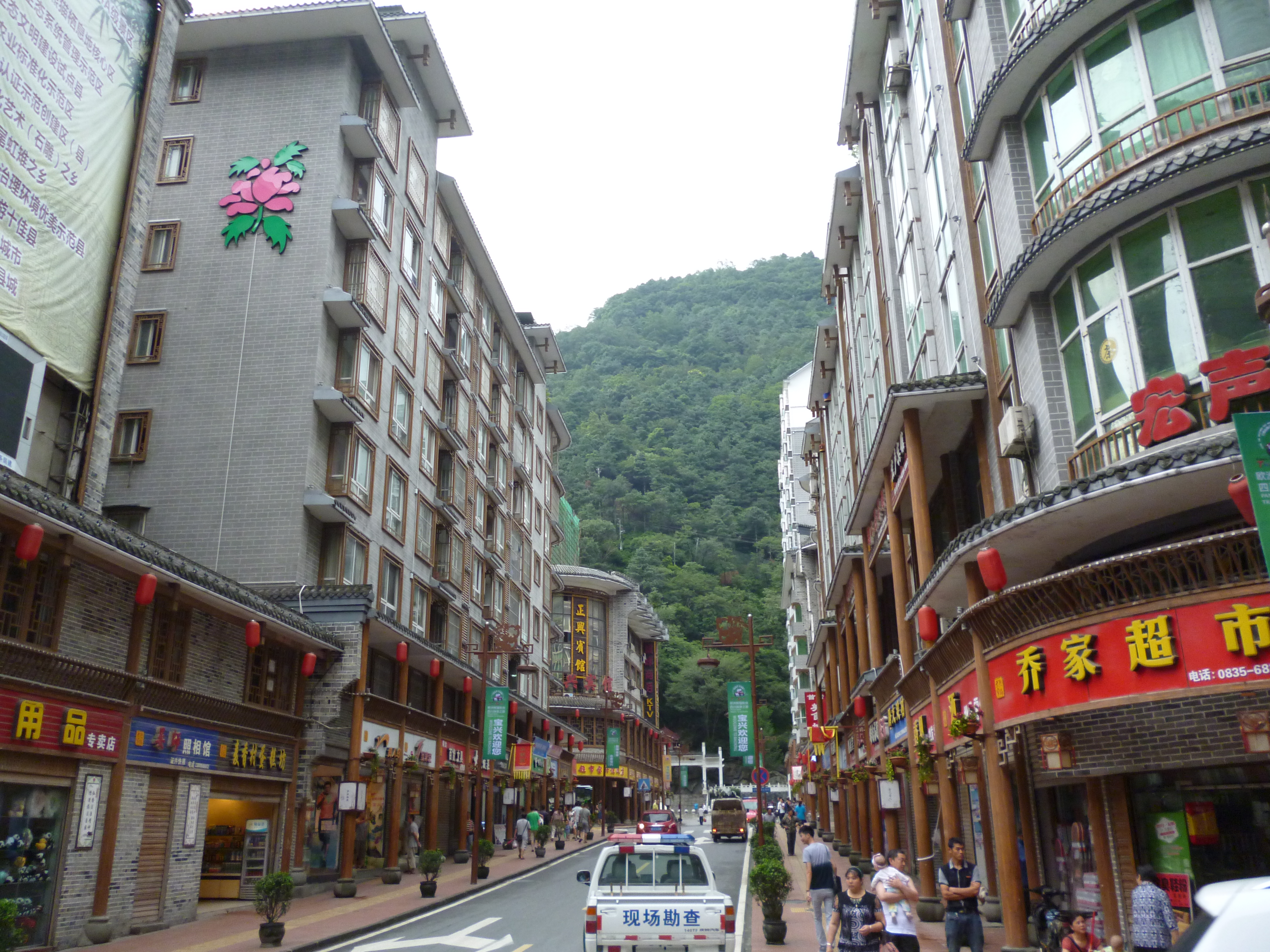 中文（中国大陆）: 四川省雅安市宝兴县穆坪镇街景